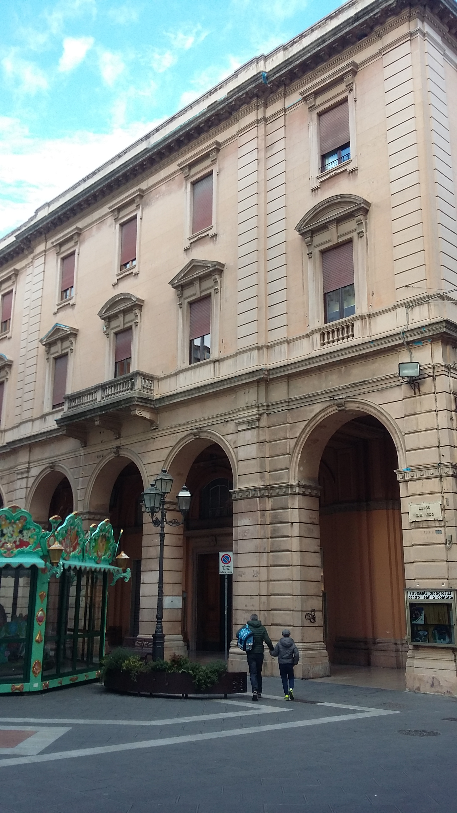 I proprietari di questo palazzo ideato negli anni 30 e adiacente a Piazza Gianbattista Vico erano imparentati con Benedetto Croce.